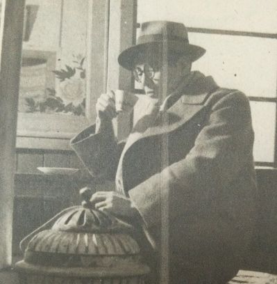 加藤まさを